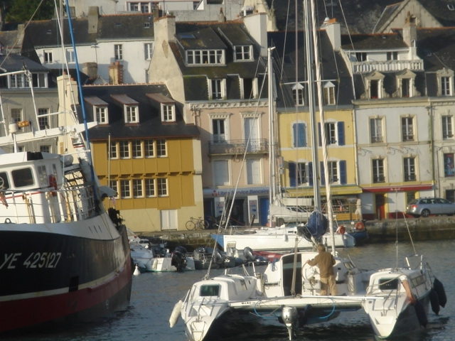 Encombrement du port: deux catamarans, un chalutier et un plaisancier Le Palais (56)